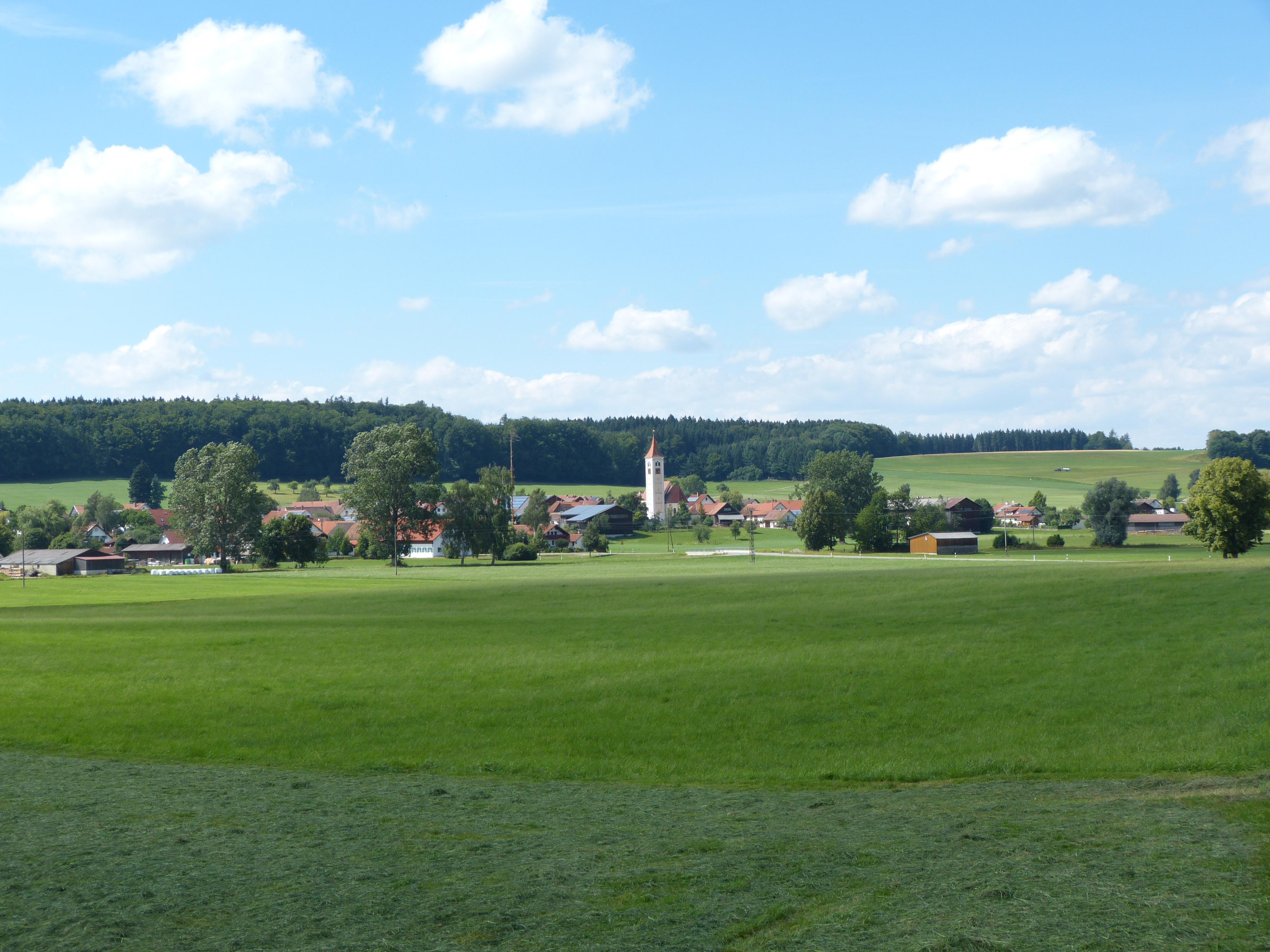 Westernach, Landkreis Unterallgäu, Bayern